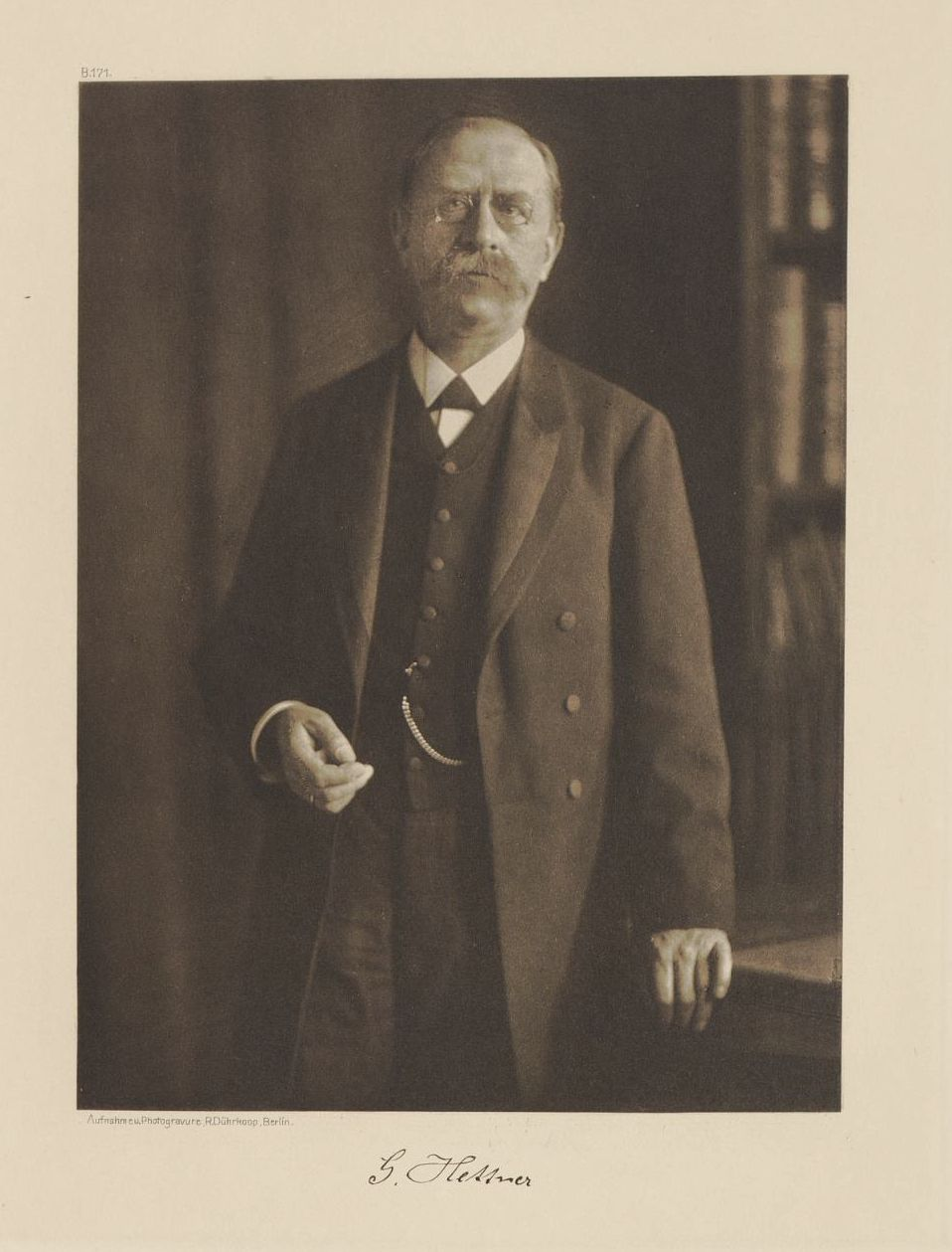 Geort Hettner. Foto.